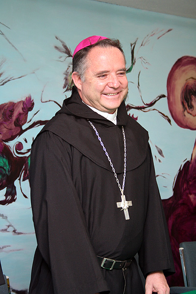 Mons. Carlos Briseño